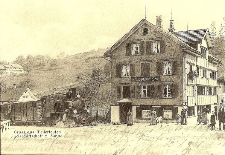 HG 2/4 der Appenzeller-Strassenbahn (ASt) auf der damaligen Zahnradstrecke Lustmühle – Niederteufen